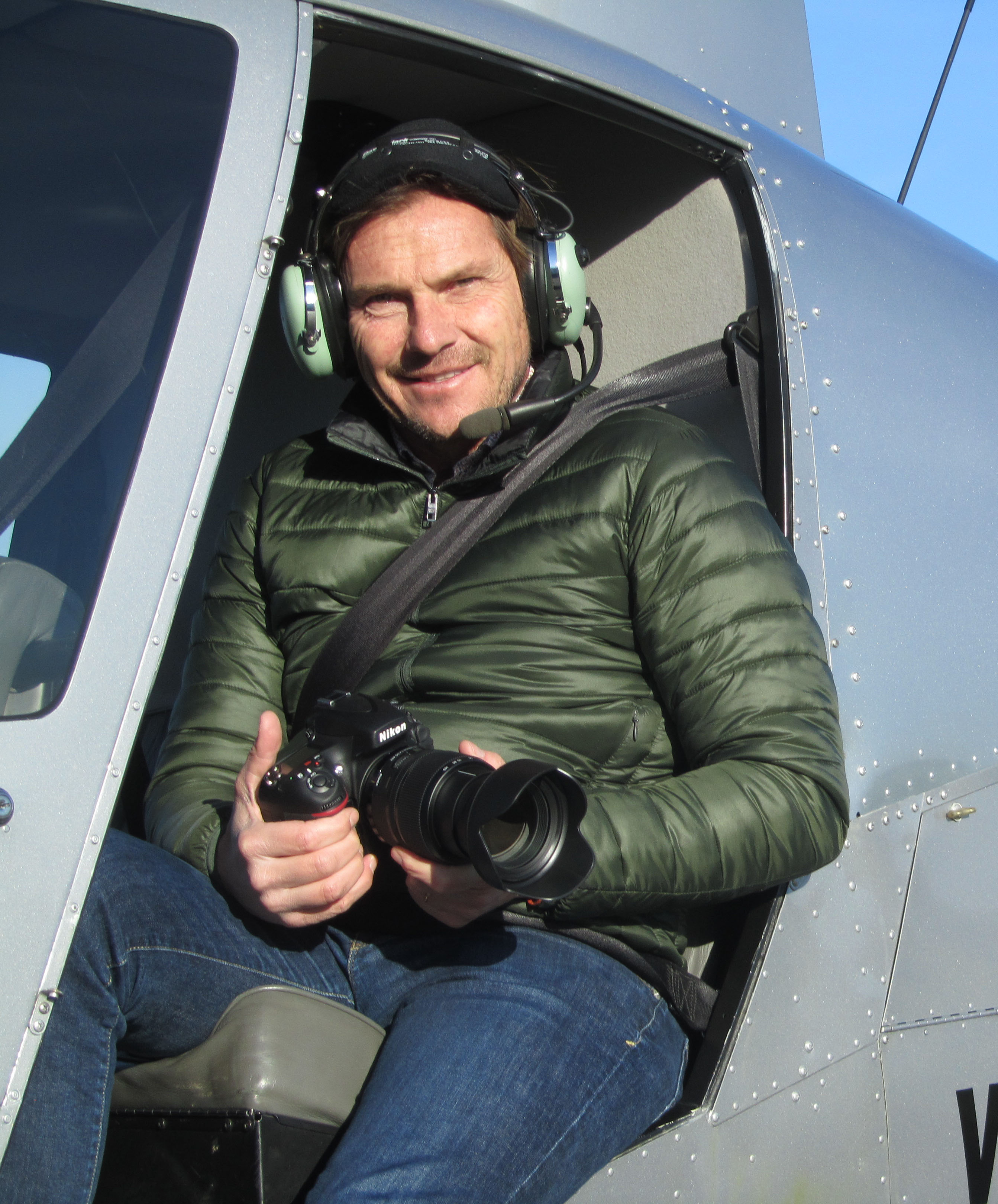 Portrait de Didier de Radiguès